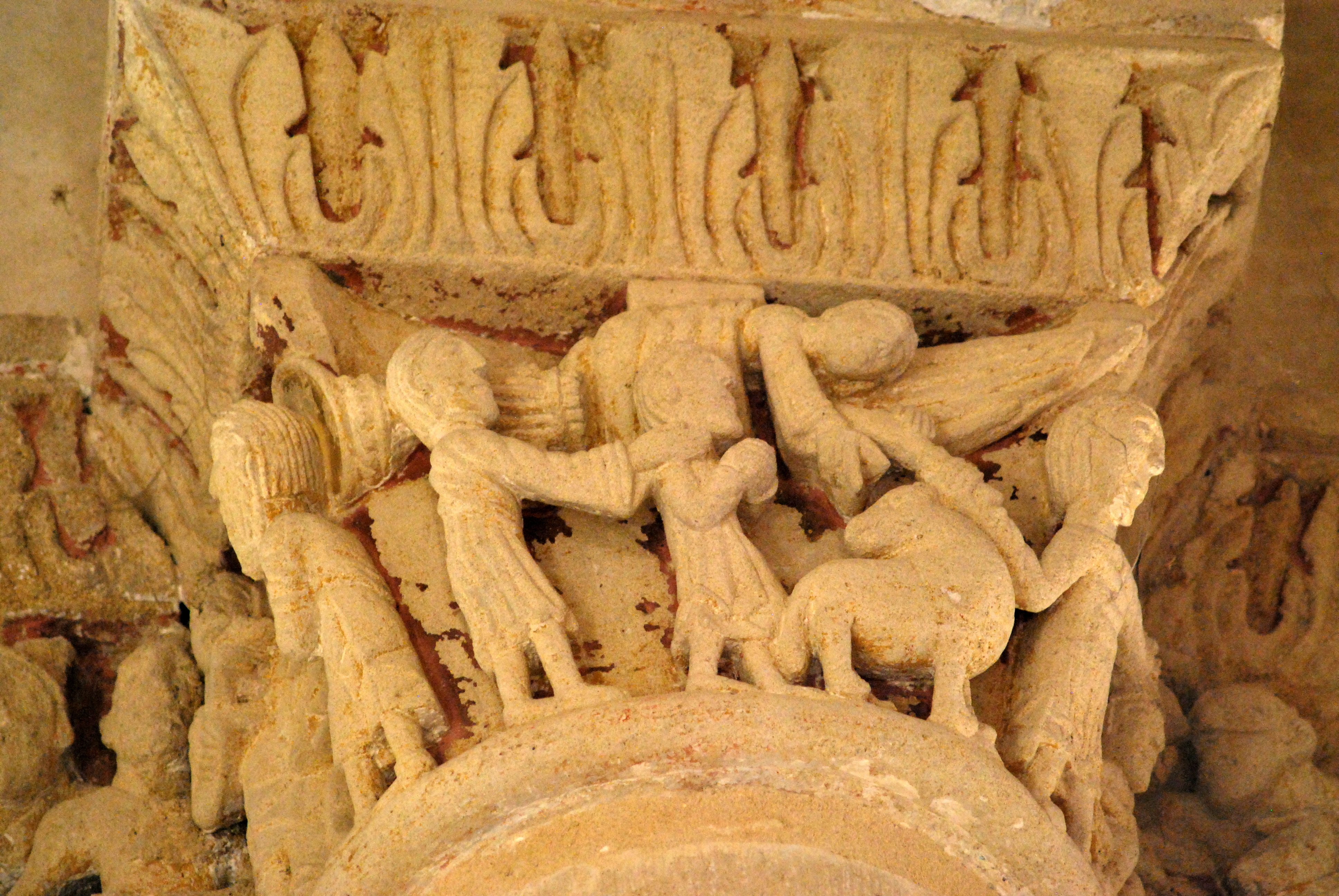 Église Saint-Quentin de Baron, Gironde